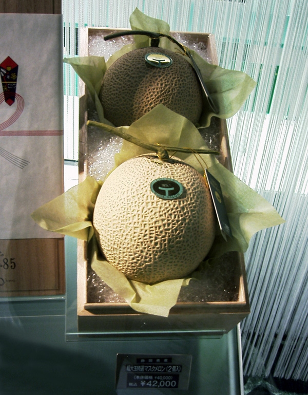 Muskmelons of Shinjuku Takano, Tokyo, Japan.